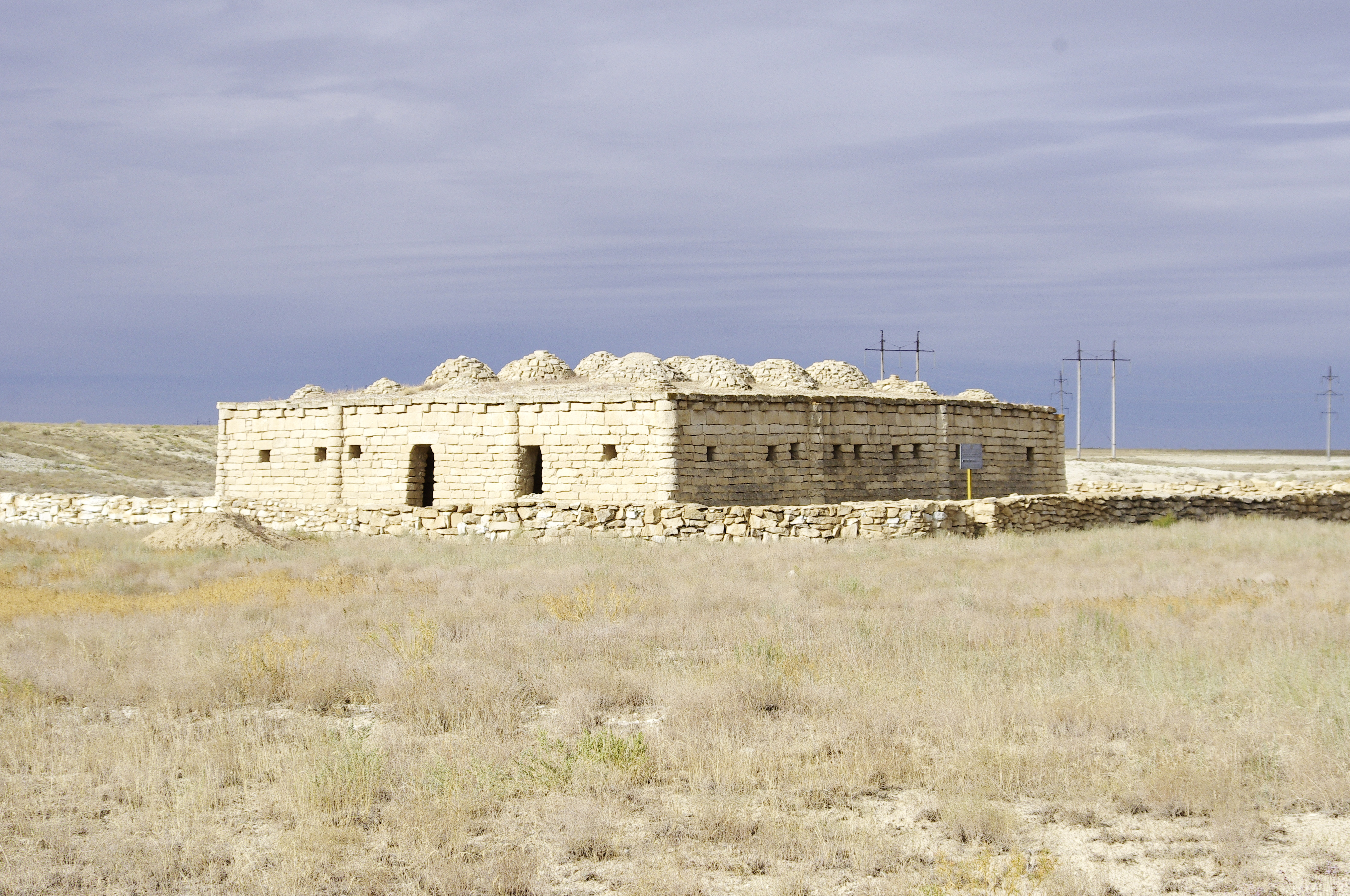 The making of this document was supported by Wikimedia Polska. To zdjęcie zostało wykonane podczas Wikiwyprawy 2015. Wszystkie zdjęcia z wyprawy możesz zobaczyć w kategorii: Wikiwyprawa 2015. English | polski | +/− To zdjęcie zostało załadowane dzięki współpracy z firmą Hyperbook. polski | +/− To zdjęcie zostało załadowane dzięki współpracy z firmą: Kopex Group. English | polski | +/−